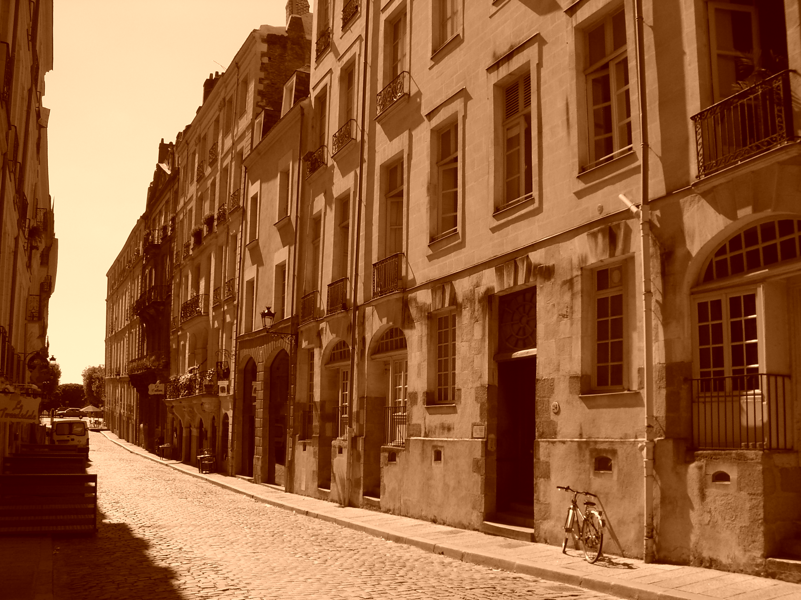 Rue de l'Ile Feydeau, ne cherchez pas l'eau qui entoure cette île car elle est en dessous et recouverte par les rues, mais les fondements des immeubles est encore sur pilotis, c'est pourquoi les murs ne sont pas droits car il y a des affaissements. (Photo couleur sépia).